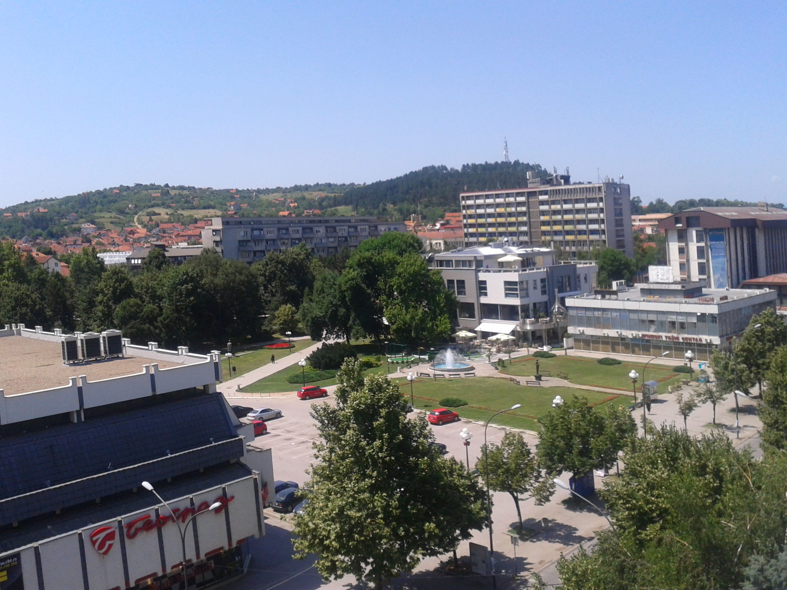 Лесковац-централни парк,споменик Томи Здравковићу